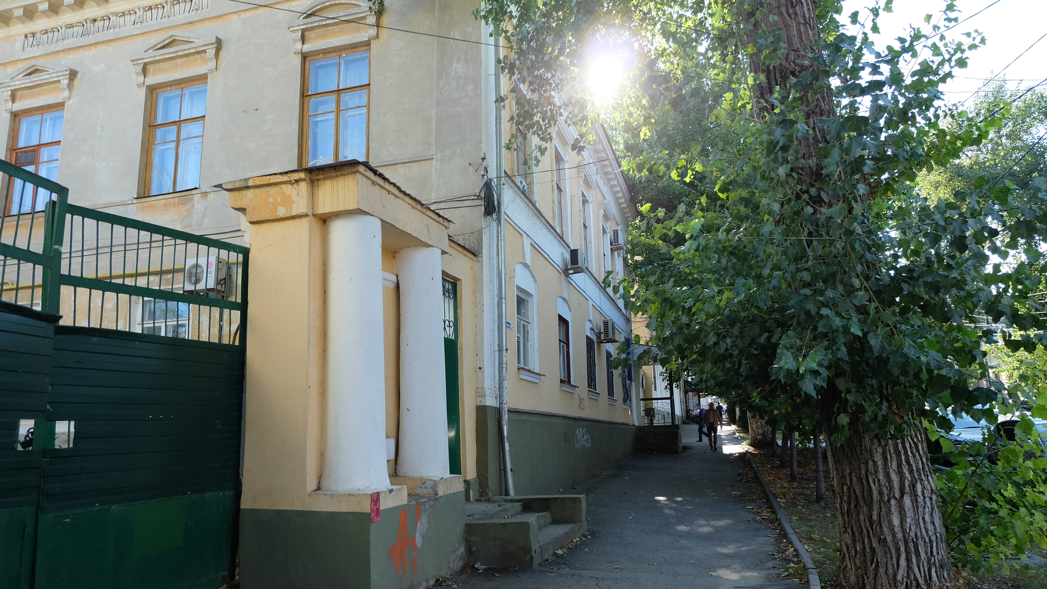 Жилой дом: переулок Тургеневский, 3, Таганрог, Ростовская область